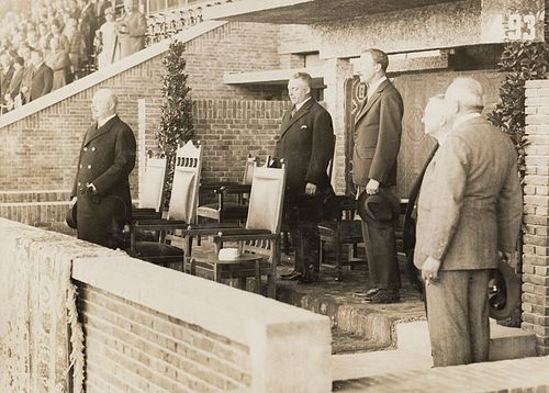 Prins Hendrik in de Koninklijke Loge in het Olympisch Stadion bij de interland tegen Uruguay. Nederland - Uruguay (0-2), gespeeld op 30 mei 1928 in het Olympisch Stadion te Amsterdam tijdens de Olympische Zomerspelen 1928